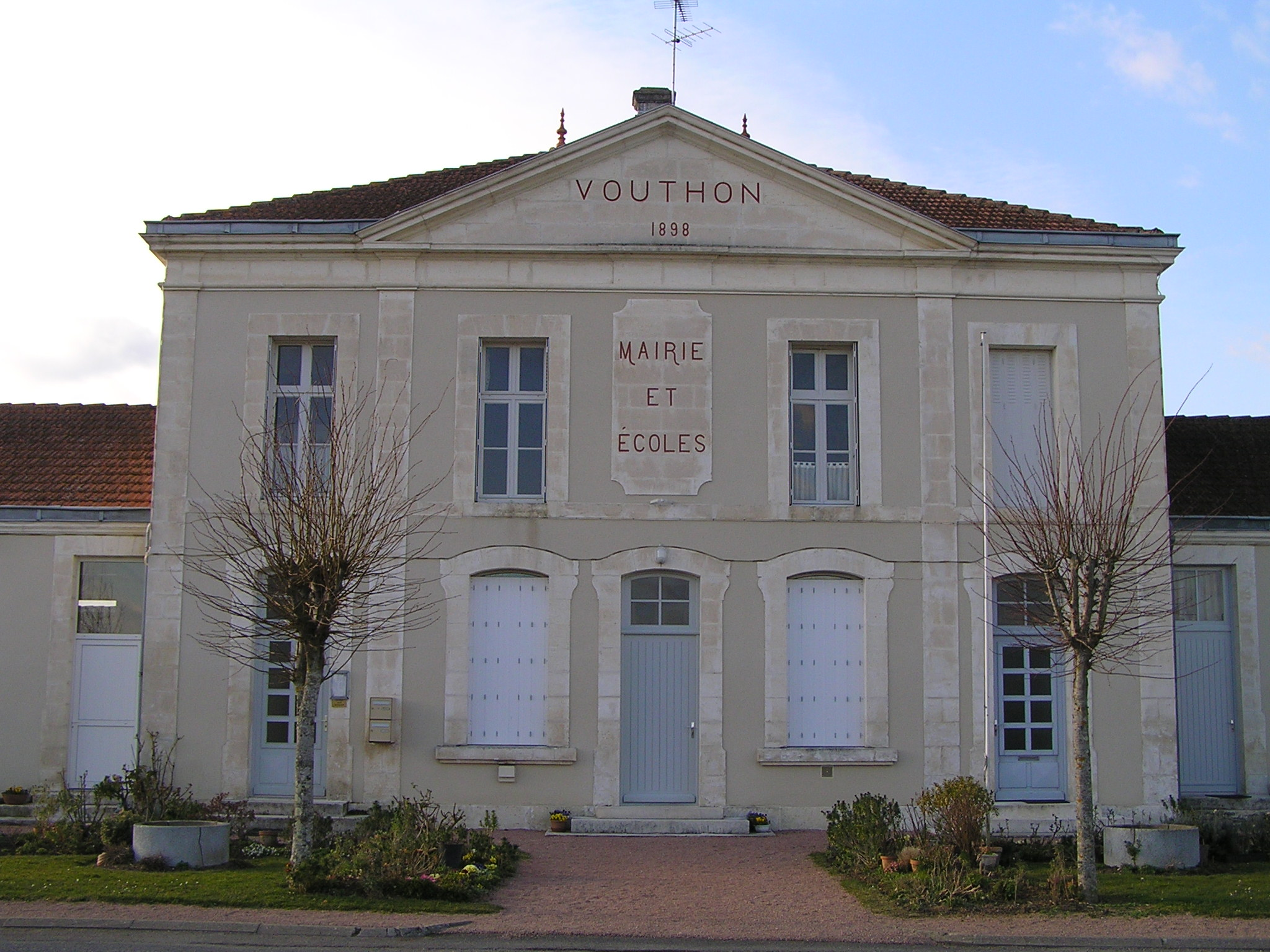 mairie de Vouthon